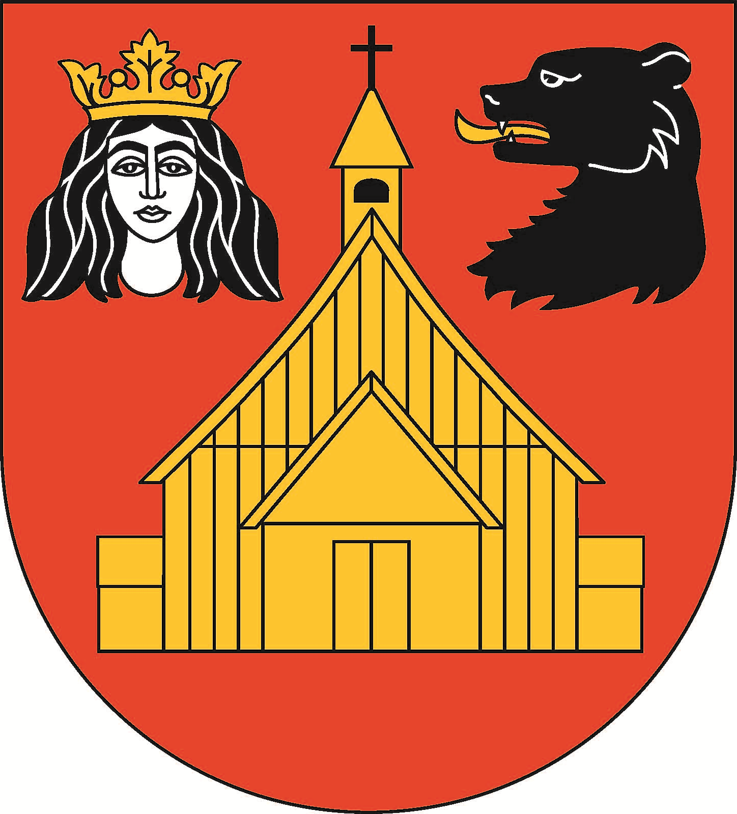 Herb gminy Rawa Mazowiecka